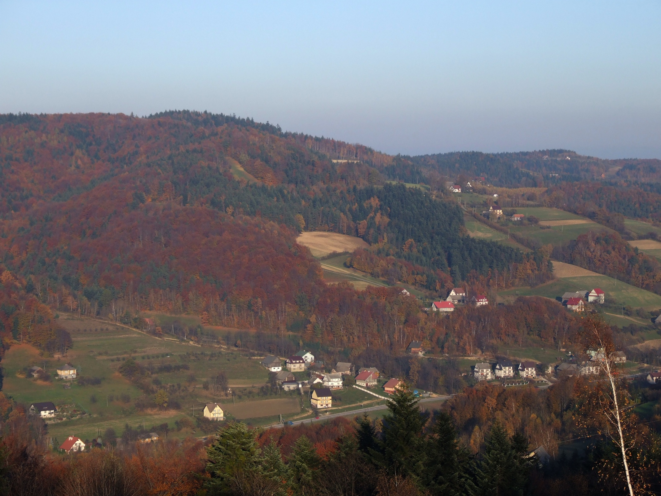 Okolice przełęczy Widoma, Łopusze i miejscowość Rozdziele